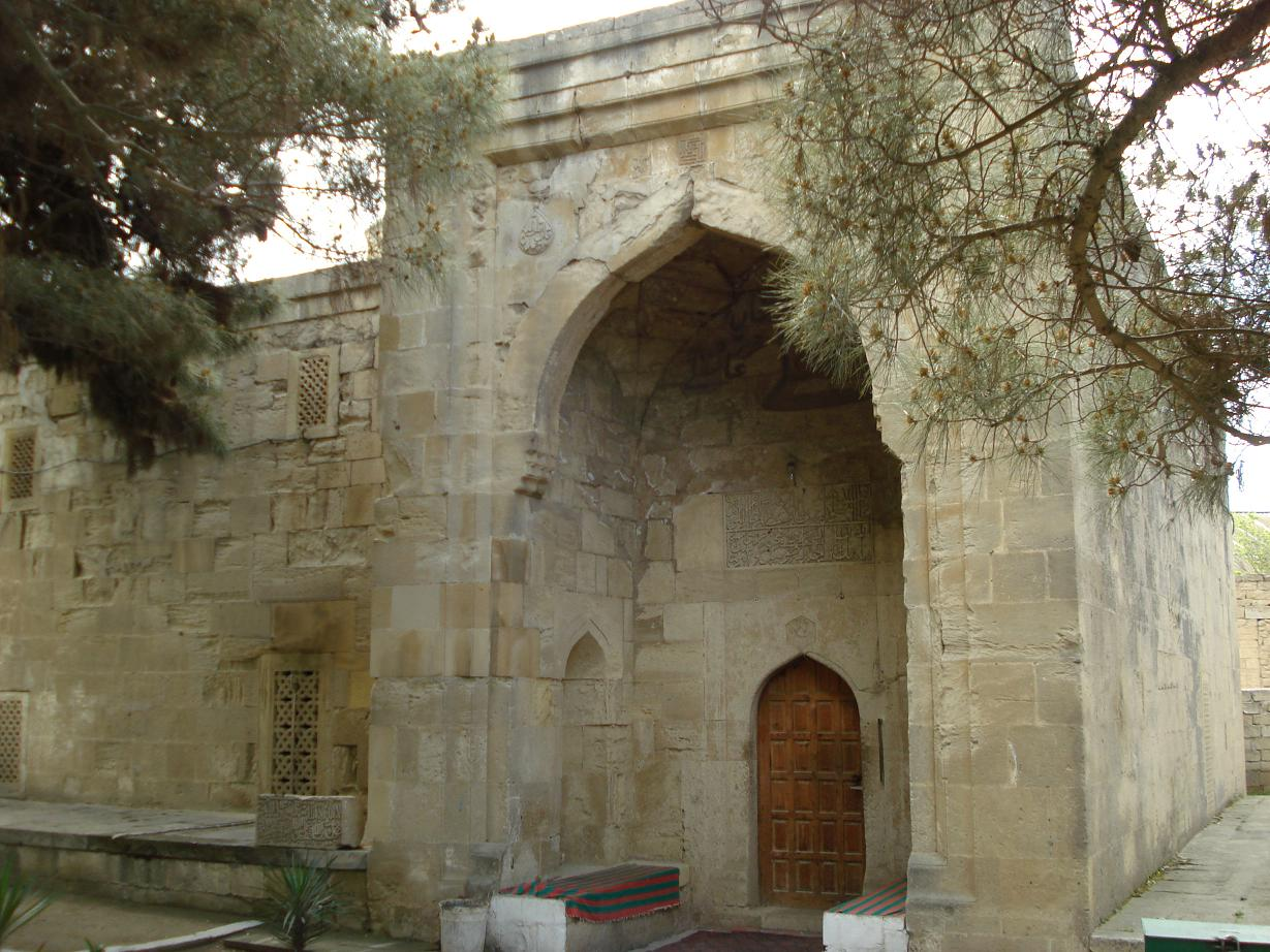 Мечеть Туба-Шахи